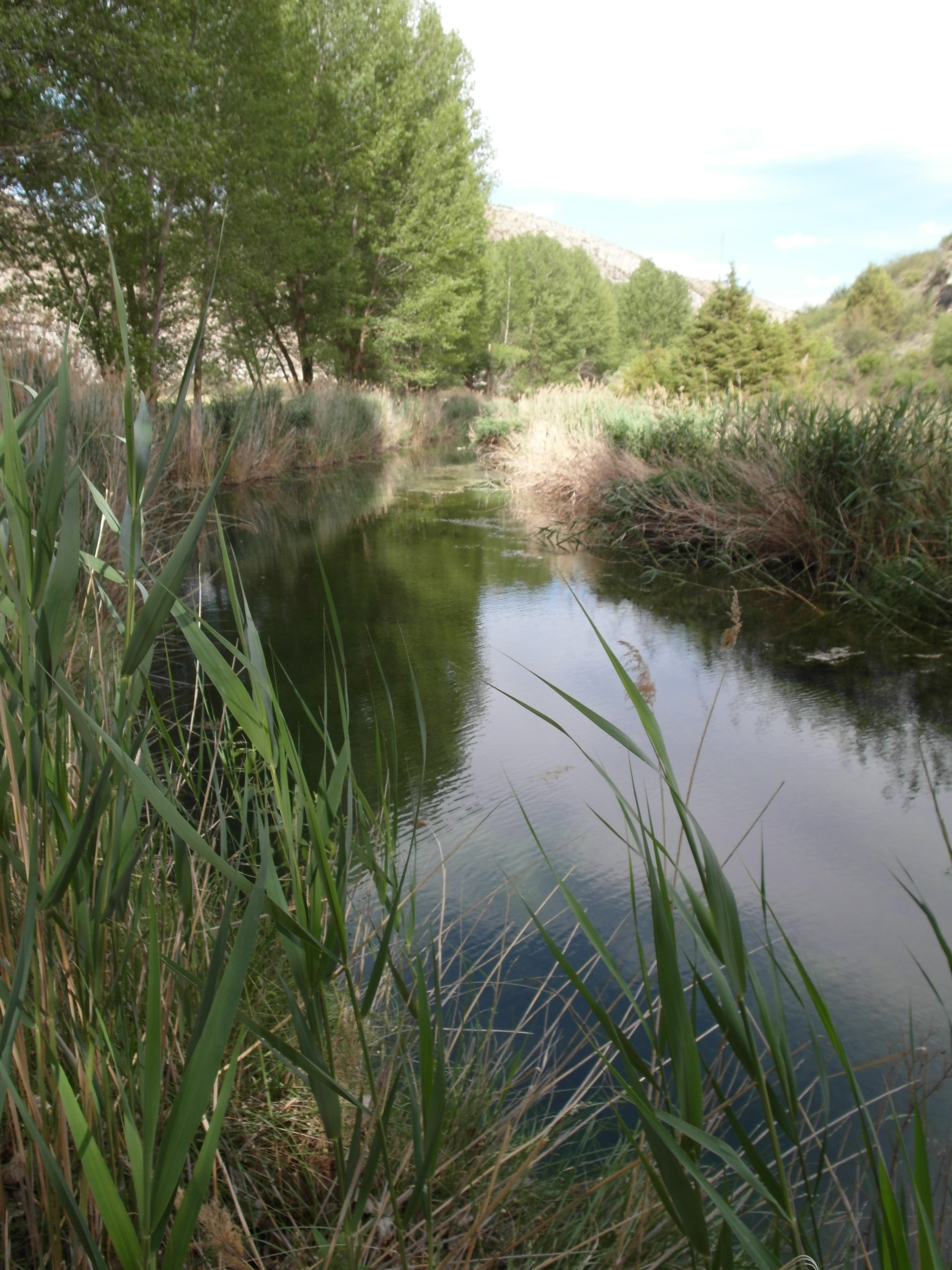 Río Abión cerca de El Buergo de Osma Soria.